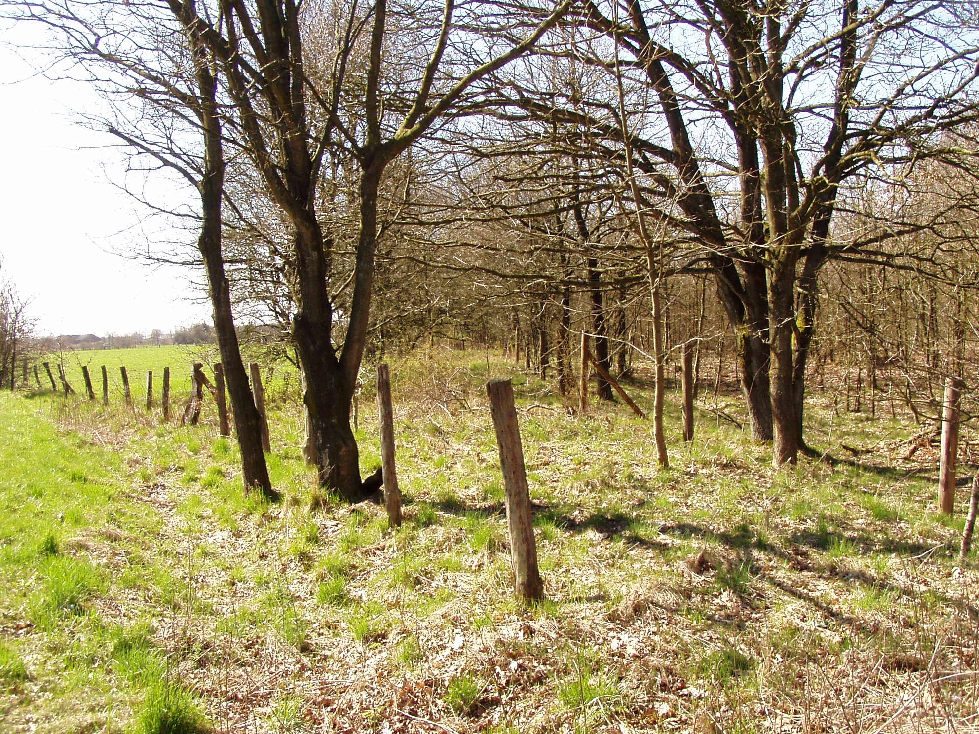 Von der K67 ging die Strecke am Rande des Mischwaldes bis Neuholzkrug. Ab dort ist sie in der neuen Straße "Neuholzkrug" aufgegangen (Blickrichtung Süd).